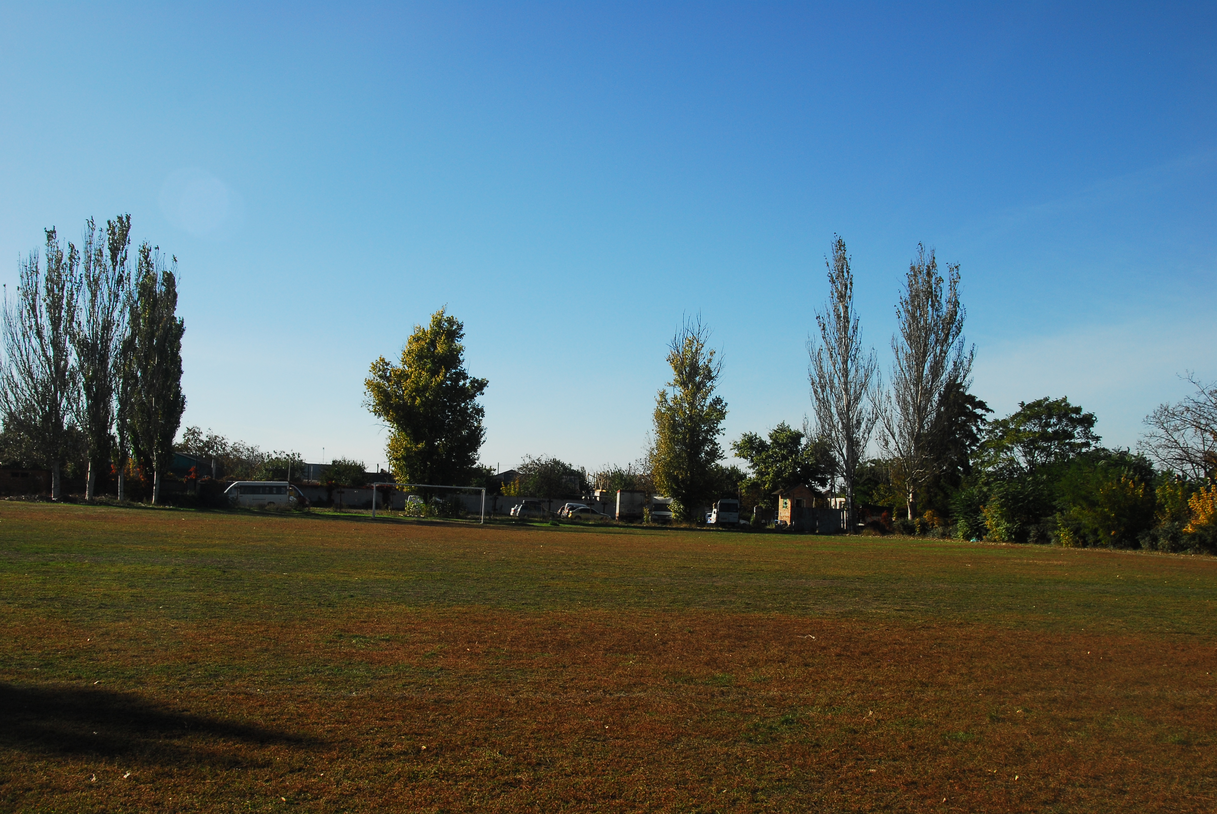 Мелитополь